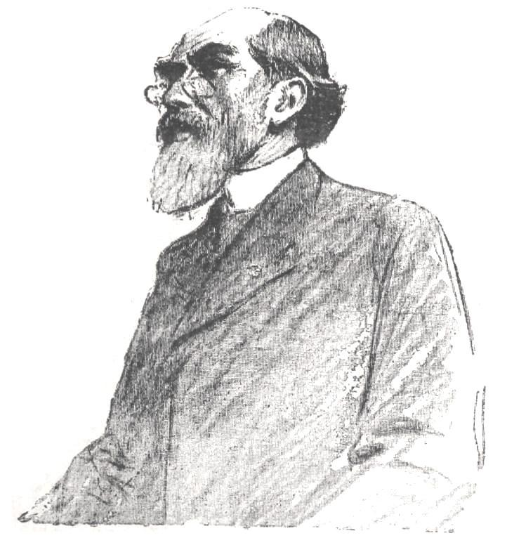 "M. Paul Meyer." (Huitième audience du procès Zola)